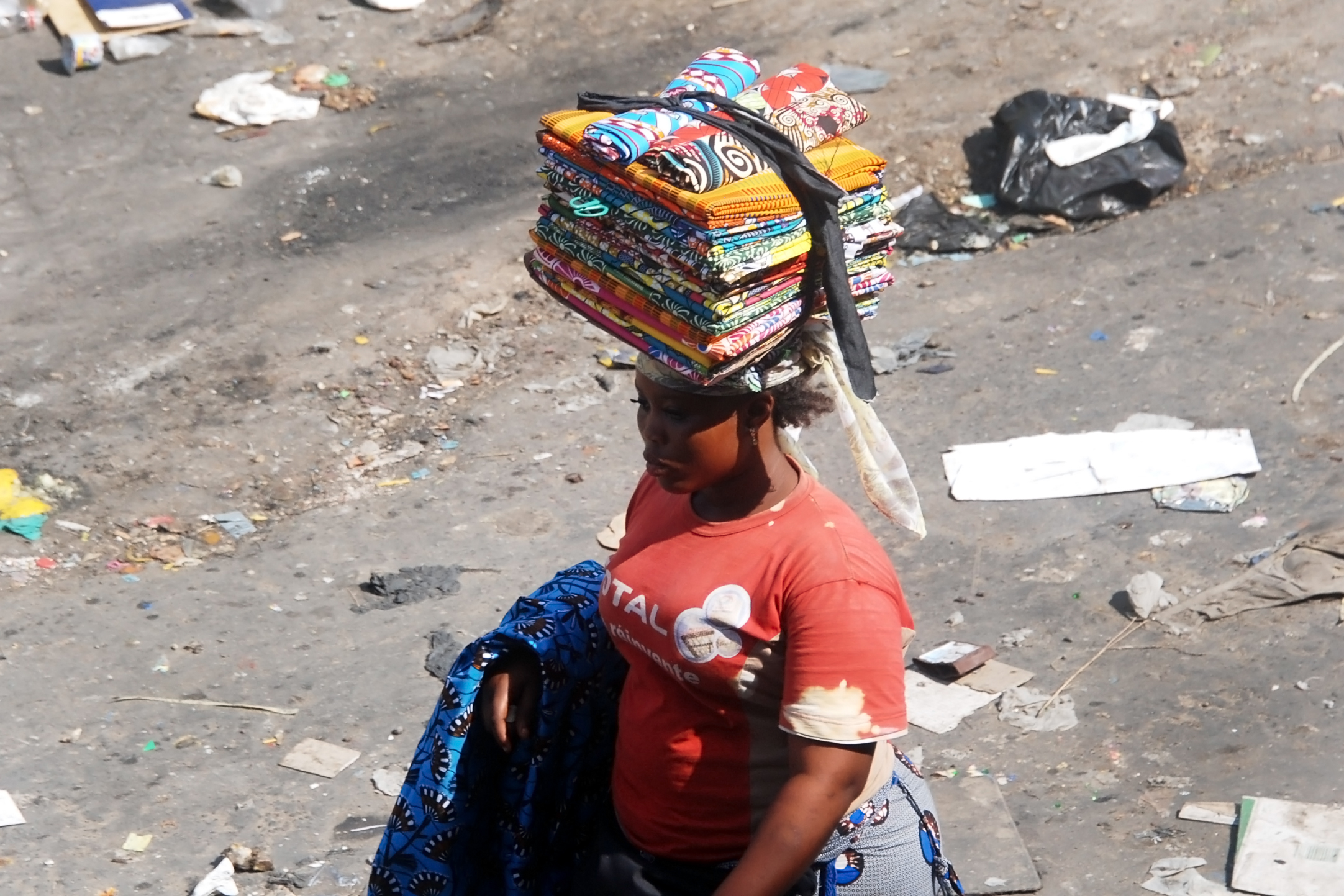 vendeuse de pagne dans les rues d'Abidjan This is an image of "African people at work" from Ivory Coast